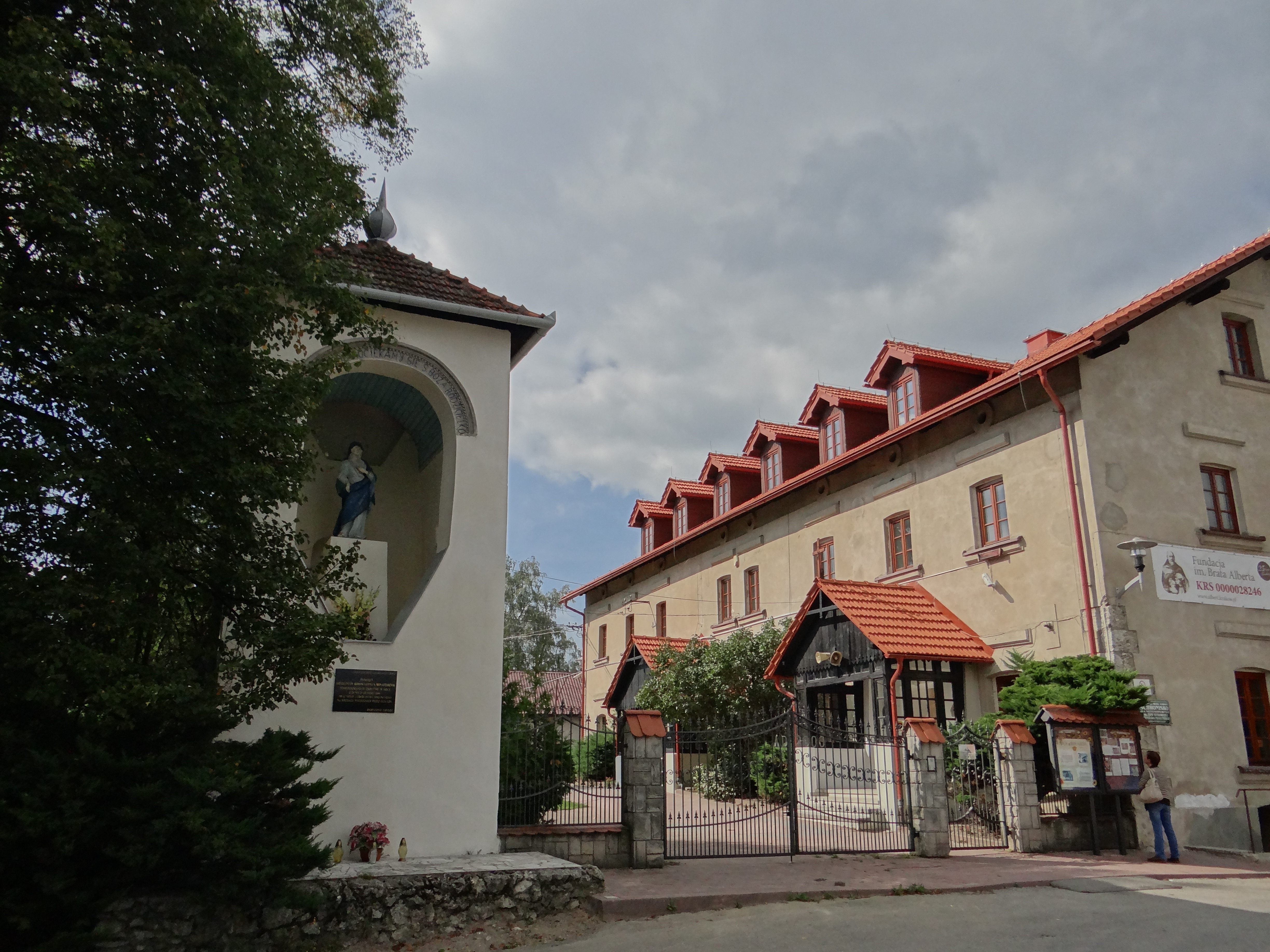 Radwanowice - zespół dworski: dwór, kapliczka, stajnia, stodoła, sad, starodrzew, droga dojazdowa z drzewami, staw